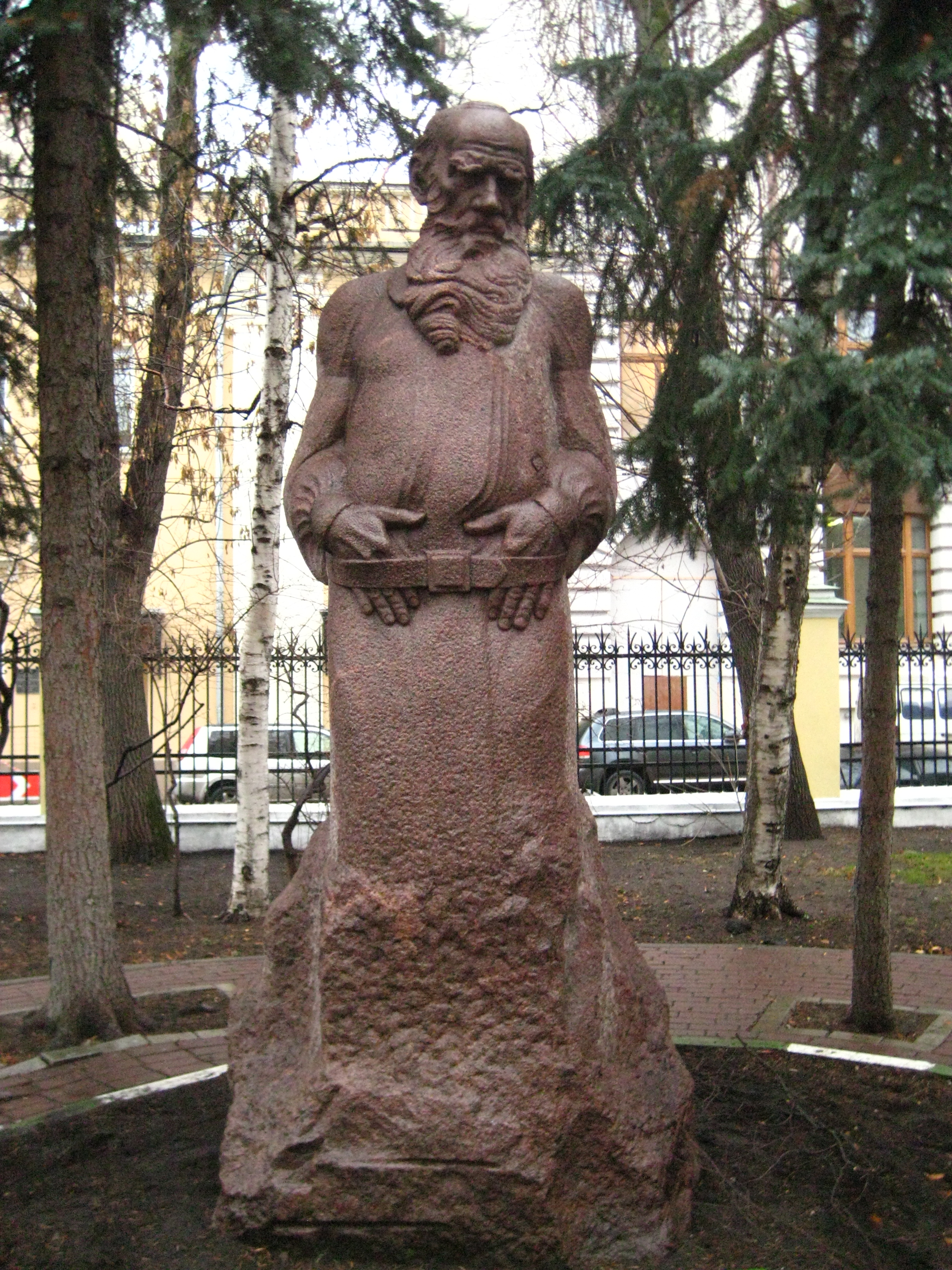 Скульптор С, Меркуров. Статуя, гранит Л. Н. Толстого, 1913 год. В 1972 году установлена у здания музея Толстого на Пречистенке в Москве.